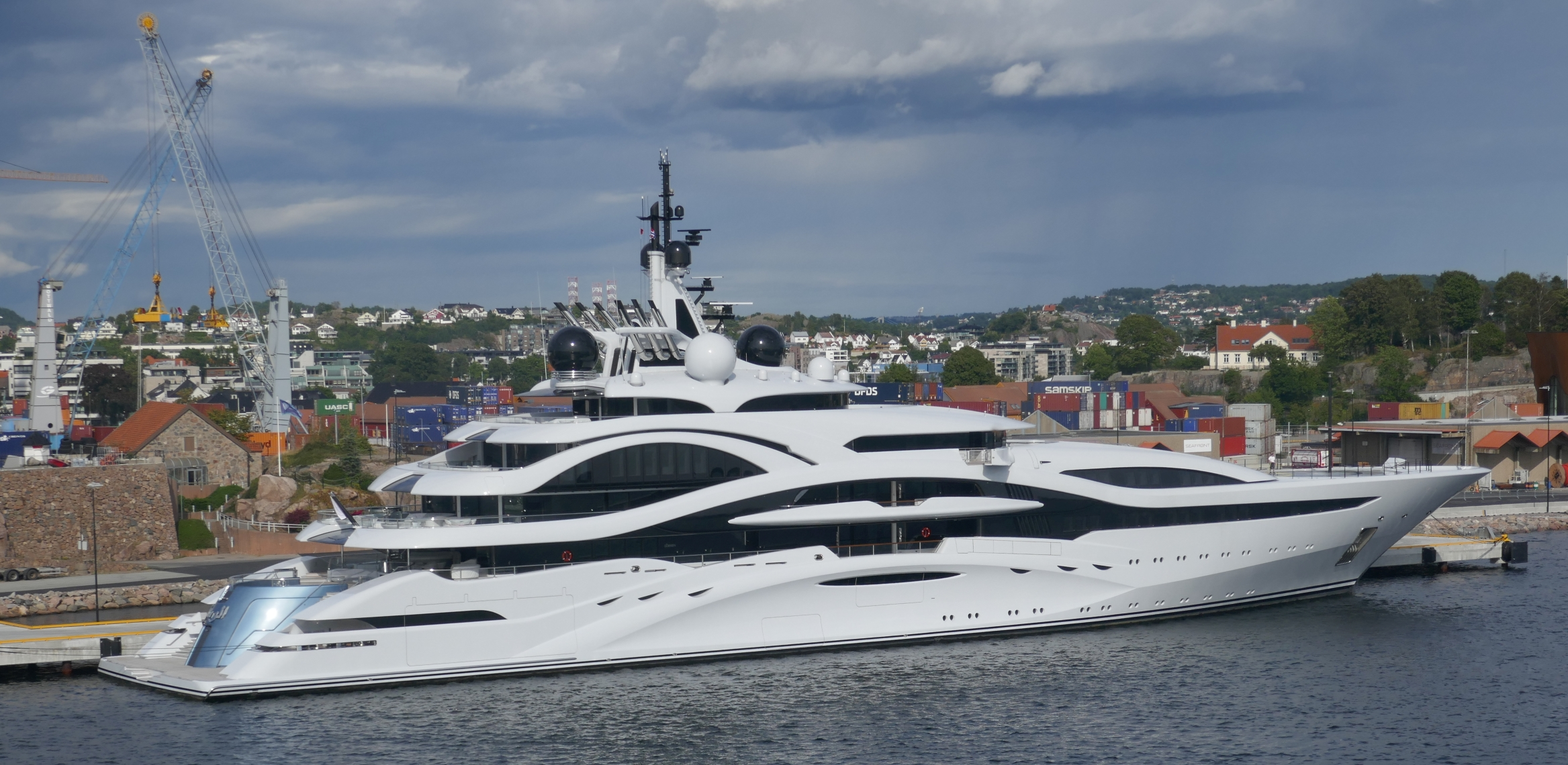 Megayacht Al Lusail im Hafen von Kristiansand/Norwegen